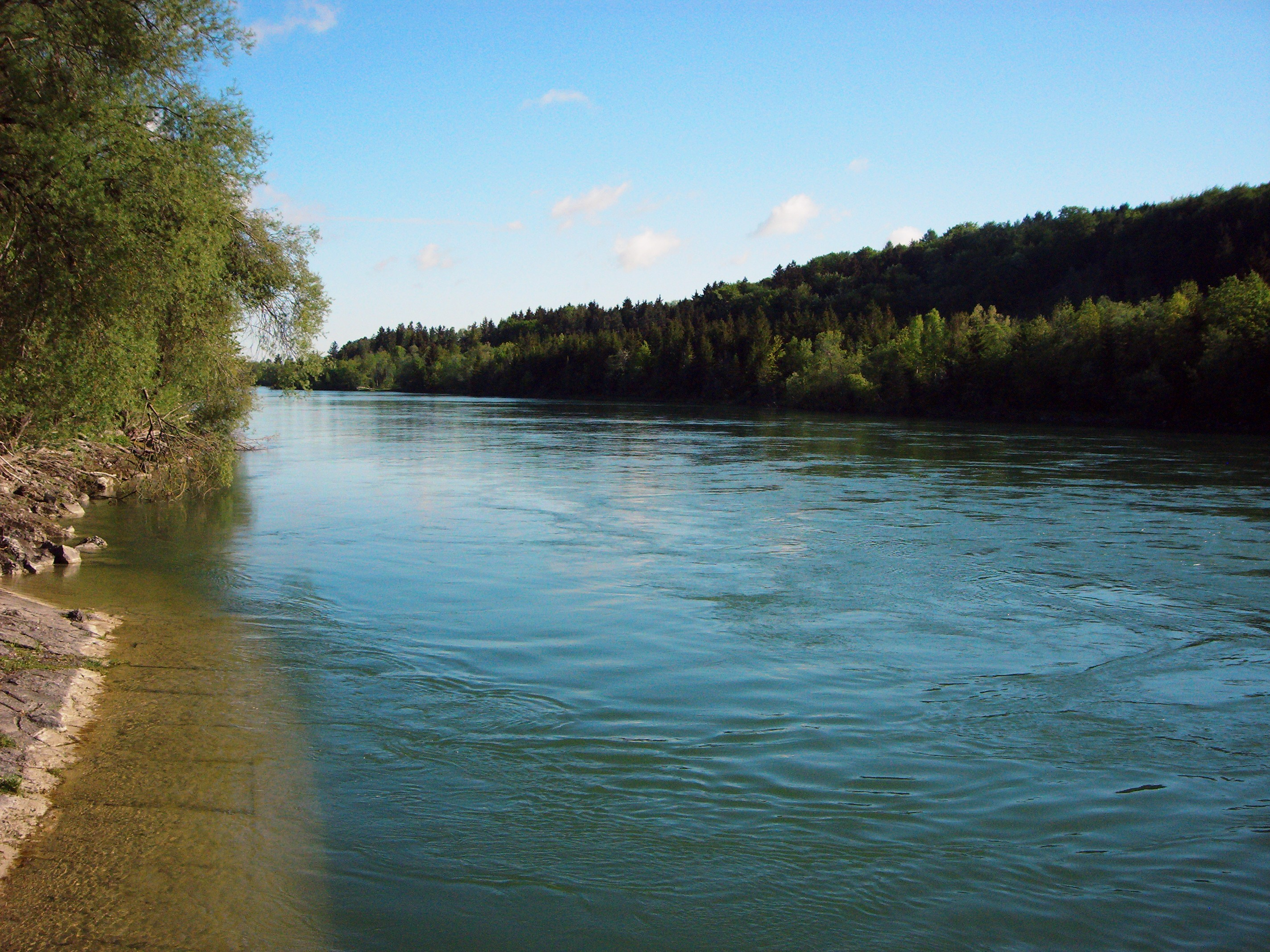 River Lech, unterhalb der Staustufe bei Seestall, Gemeinde Fuchstal, Germany